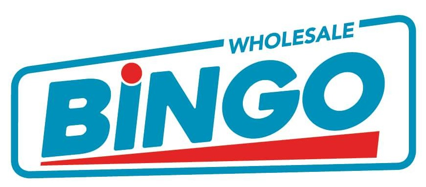 Bingo Wholesale Logo